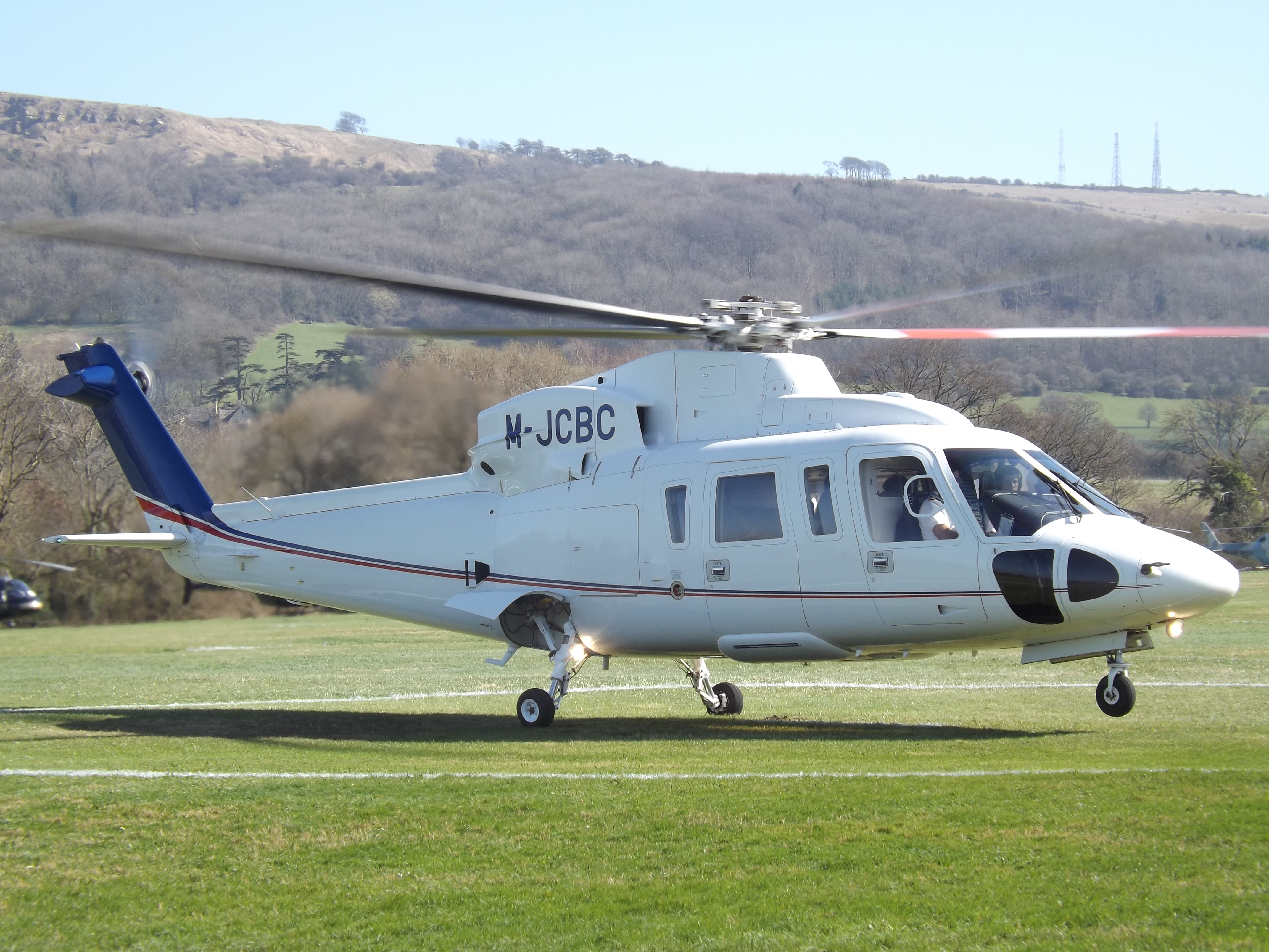 At Cheltenham Helipad.